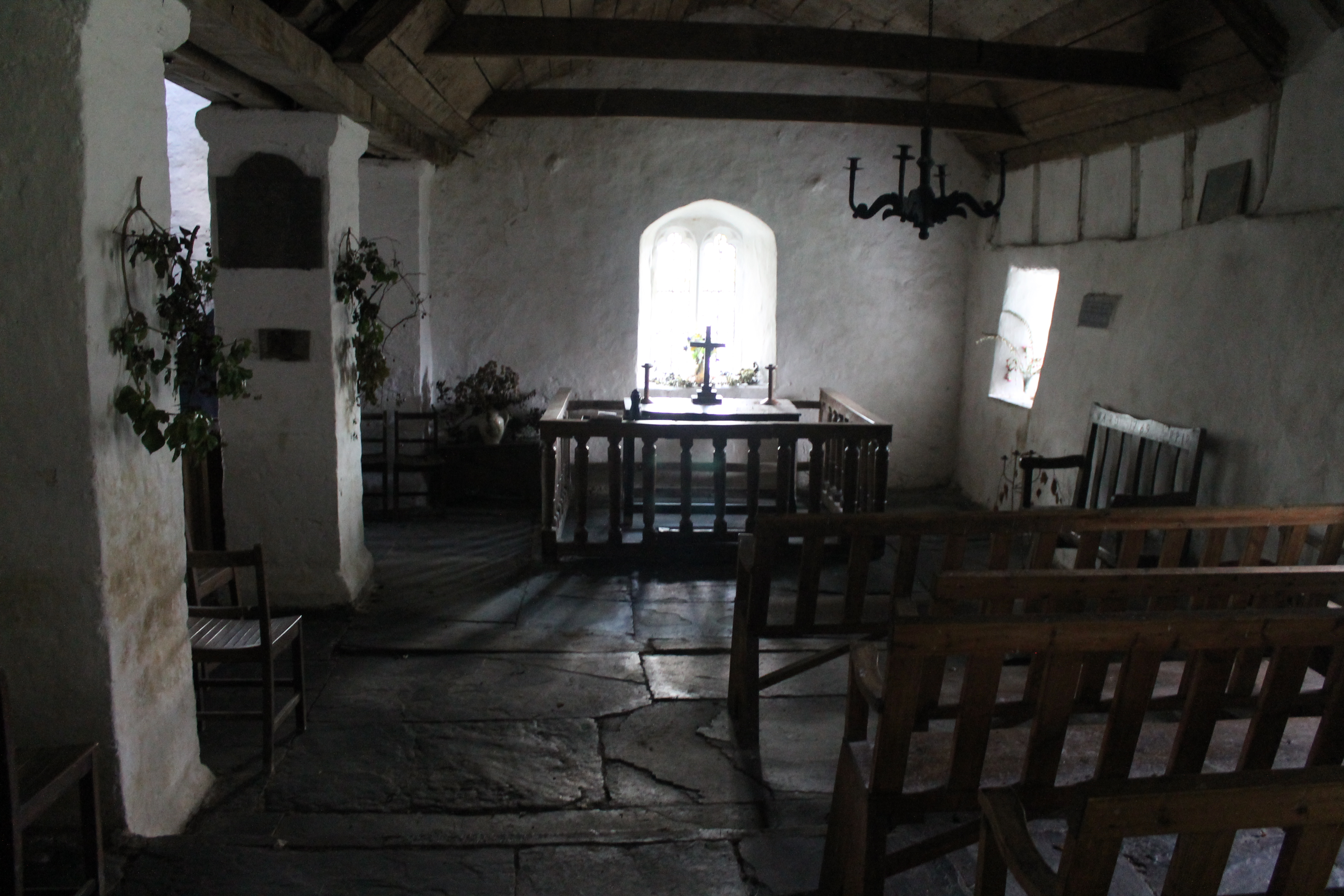 Corff deheuol Eglwys Sant Rhychwyn, Sir Conwy gan edych i gyfeiriad y dwyrain, a'r allor. Eglwys Llywelyn. Mynna rhai mai dyma eglwys hynaf Cymru.